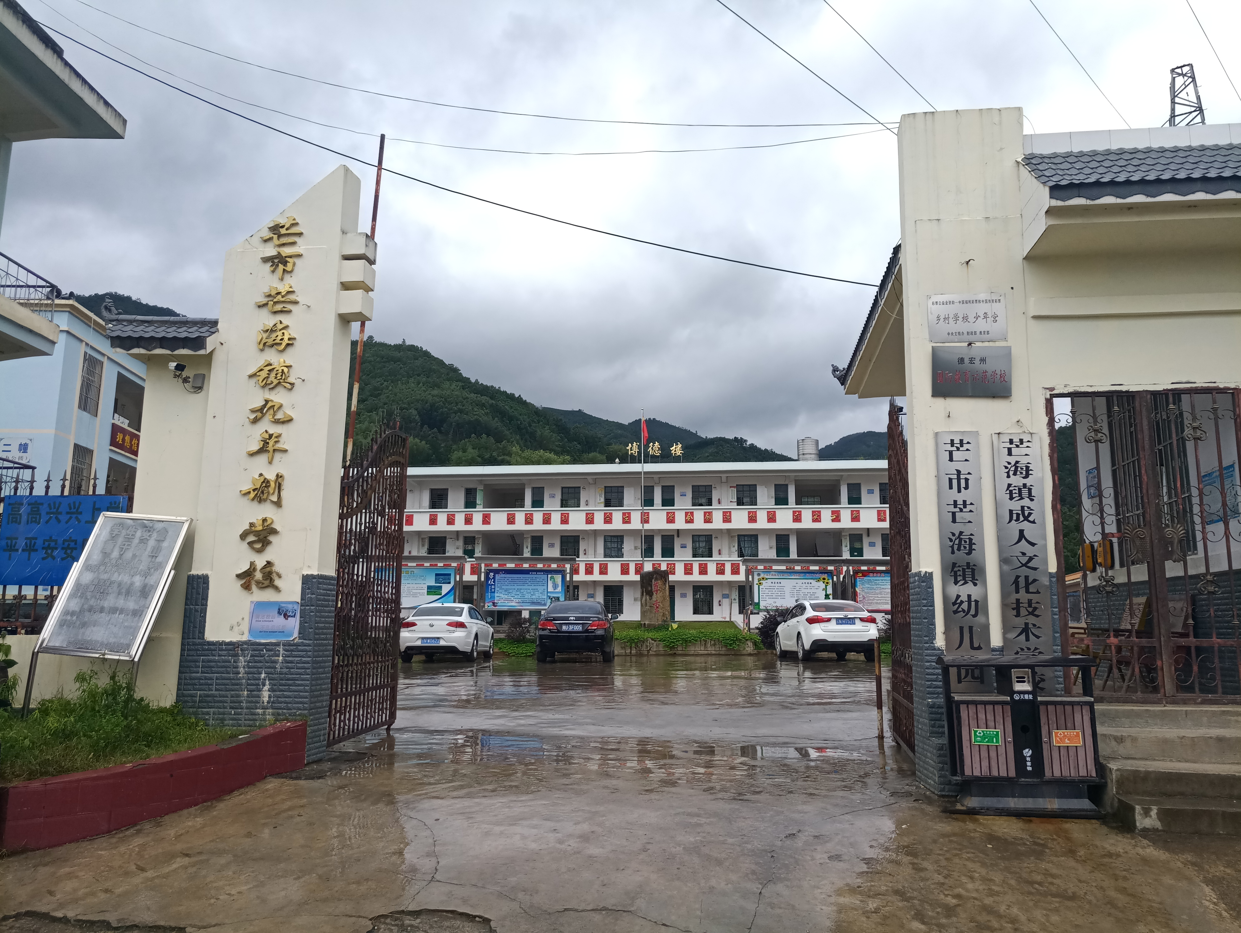 芒海镇九年制学校